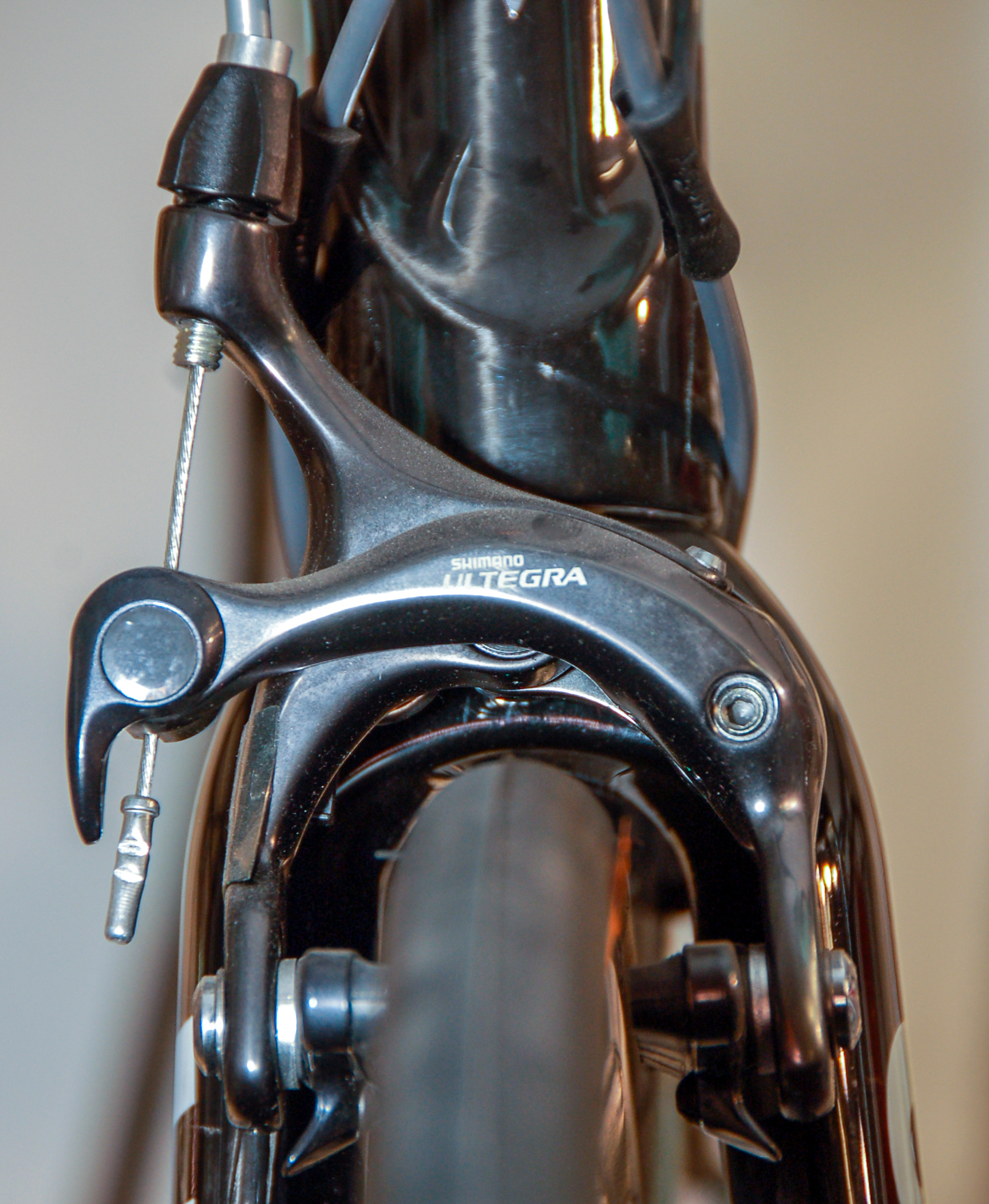 synchronisierte Seitenzugbremse Shimano Ultegra